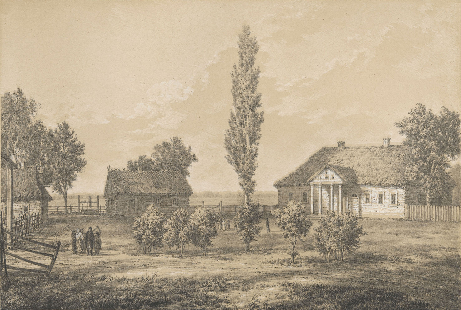 Беларуская (тарашкевіца): Смольгаў (Smolhaŭ), сядзіба Кандратовічаў (Kandratovič)